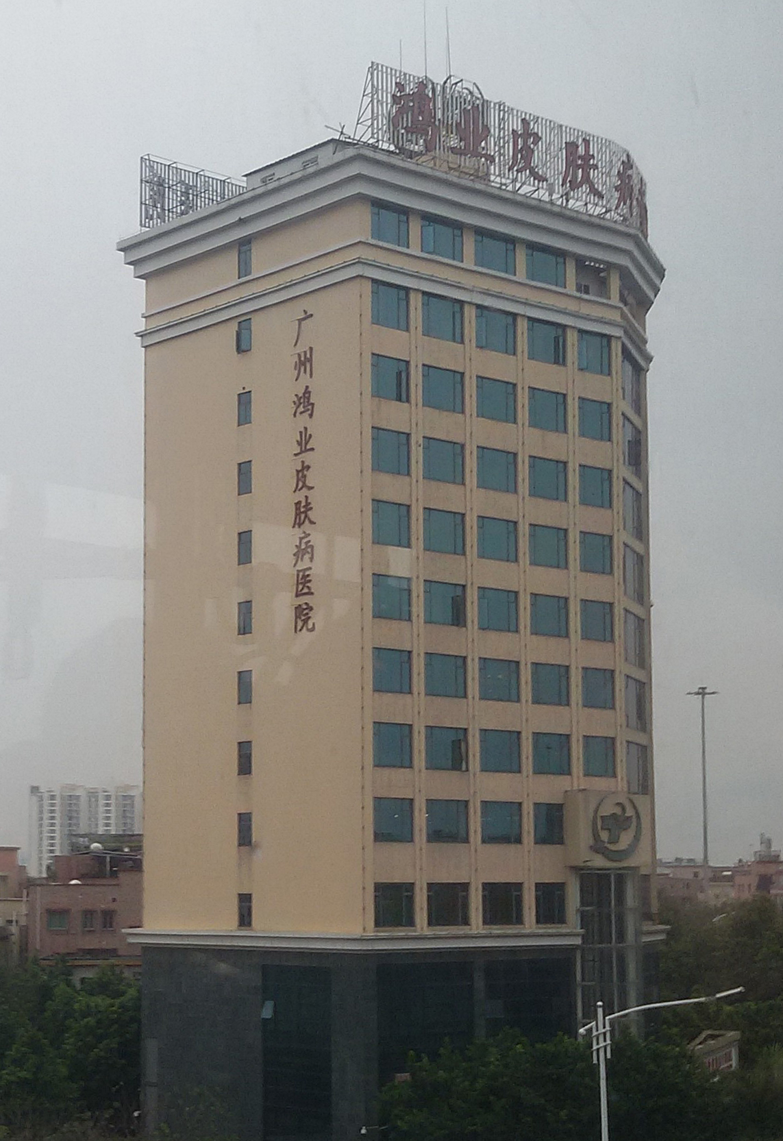 粵語: 廣州鴻業皮膚病專科醫院